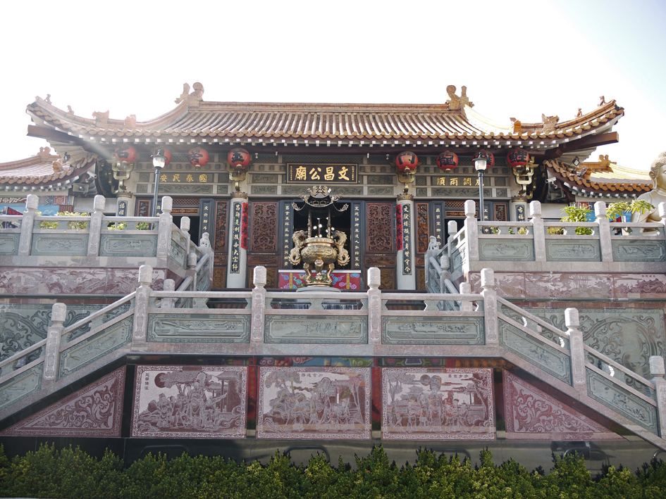 中文（台灣）: 南屯文昌公廟。